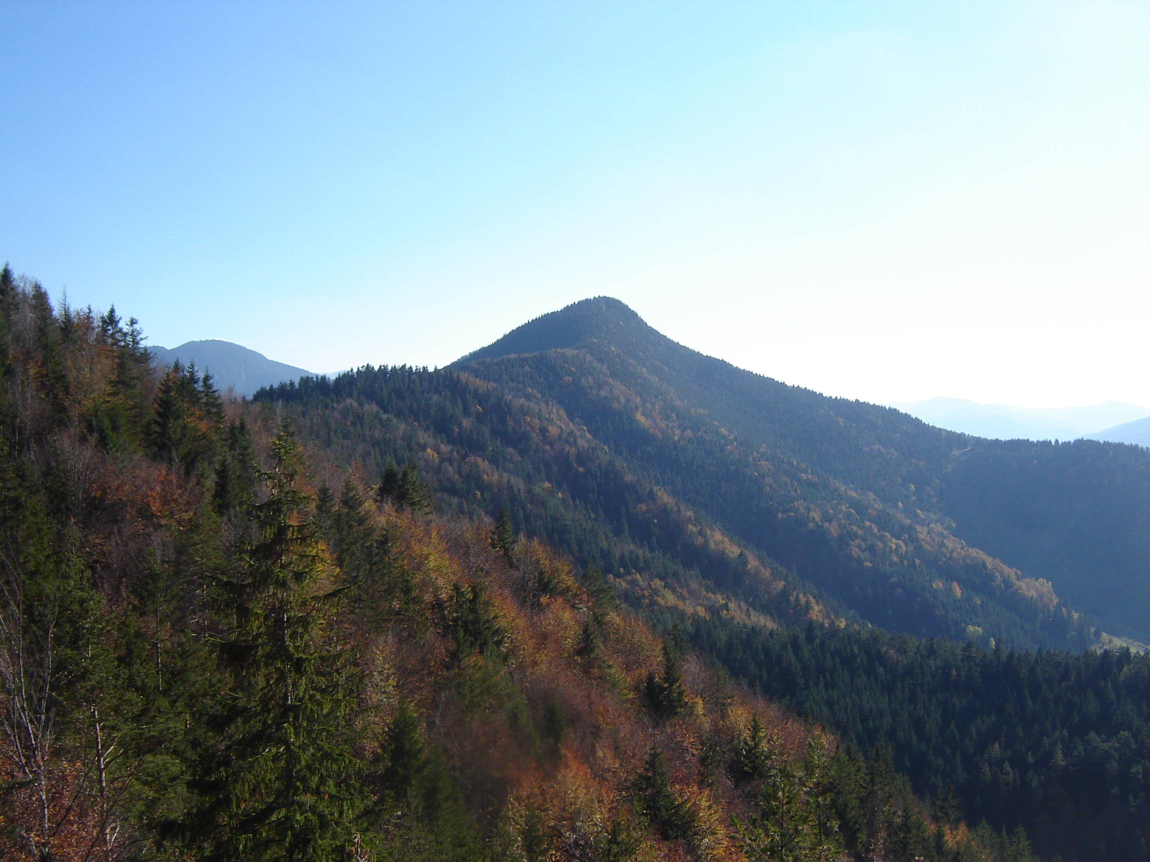 Ostrô